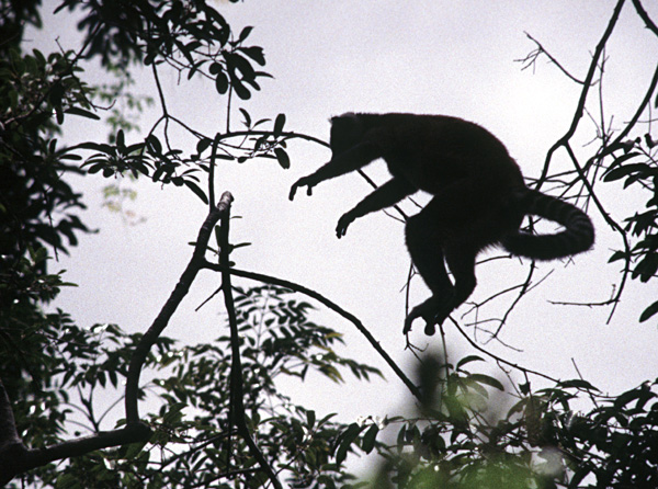 Ring-tailed Lemur (Lemur catta)